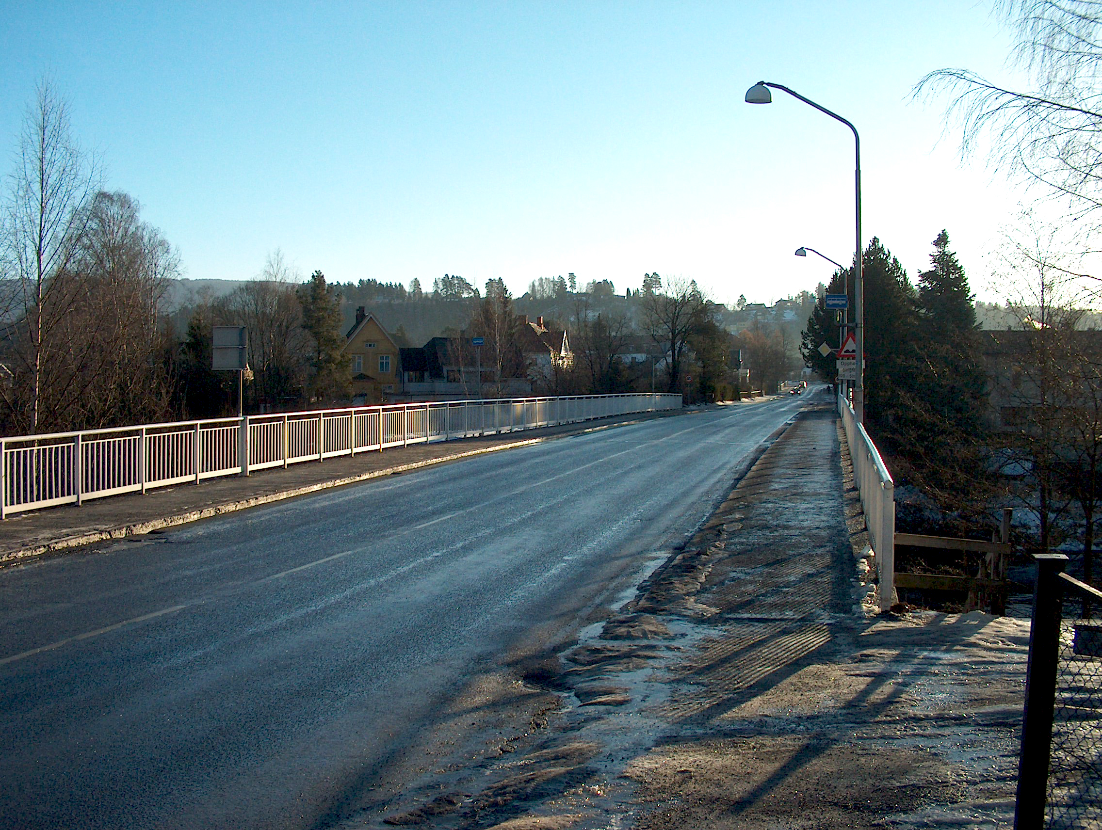 Overmannsund bru i Hønefoss (Overmannsund Bridge in Hønefoss, Norway)